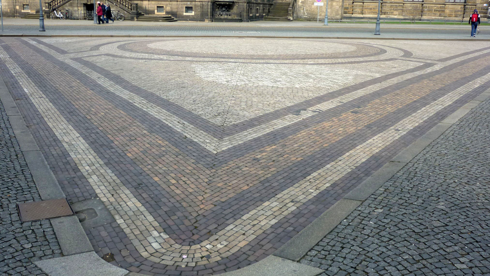 Mosaikpflaster am Taschenberg in Dresden (1896-1945 Standort des Wettin-Obelisk)